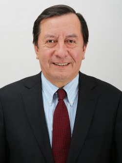 Javier Hernández Hernández